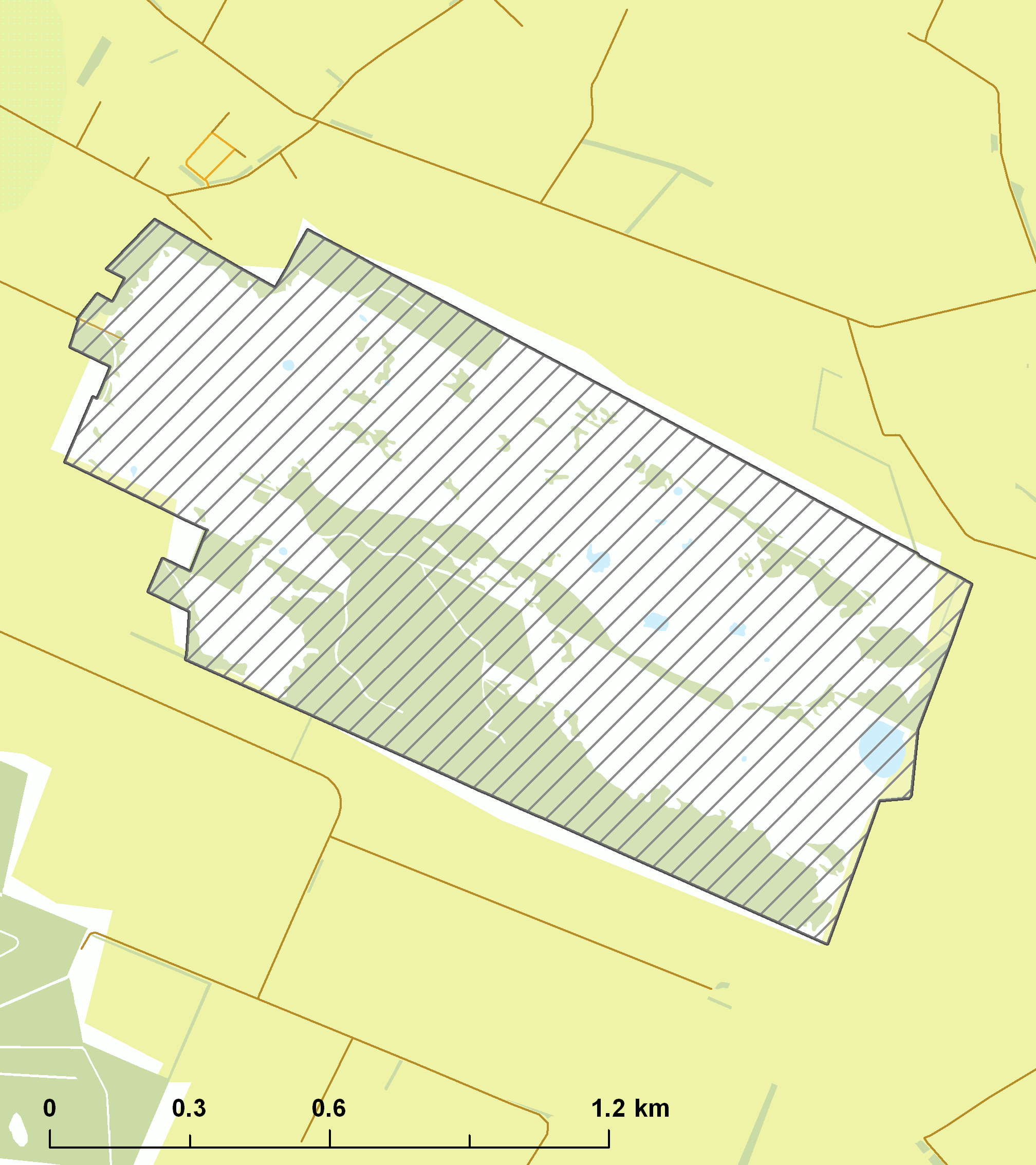 Natura2000 - Boetelerveld.png